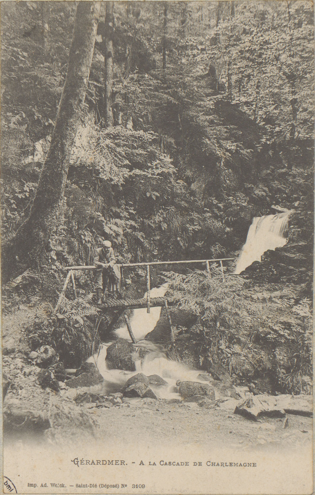 Cascade Charlemagne sur la Vologne située sur la commune de Xonrupt-Longemer dans le département des Vosges. Carte postale ancienne des éditions Adolphe Weick à Saint-Dié, n°3109